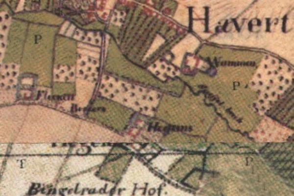 Kartenaufnahme der Rheinlande 1804/05